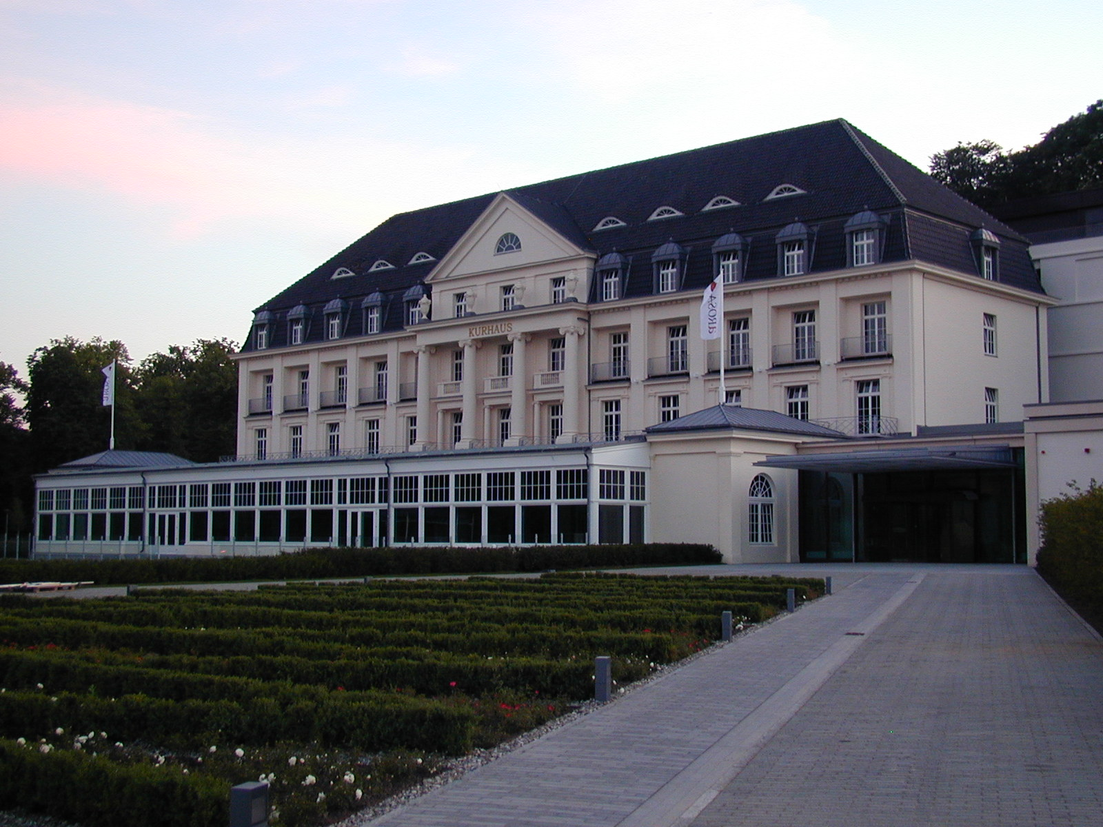 Hotel Arosa in Kurhaus in Travemünde, Deutschland